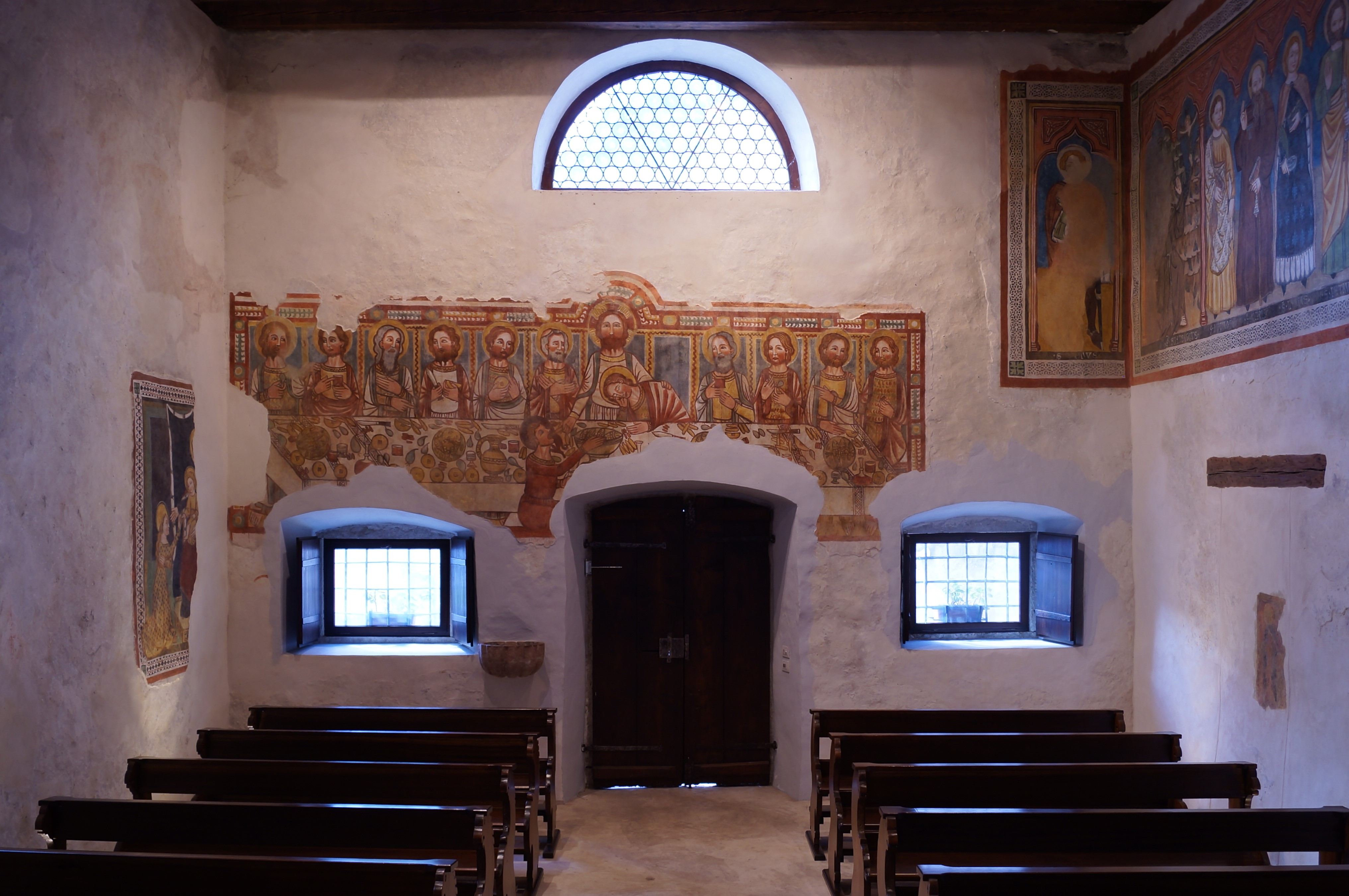 Ultima cena vista da lontano, Chiesa di San Vigilio, Pez